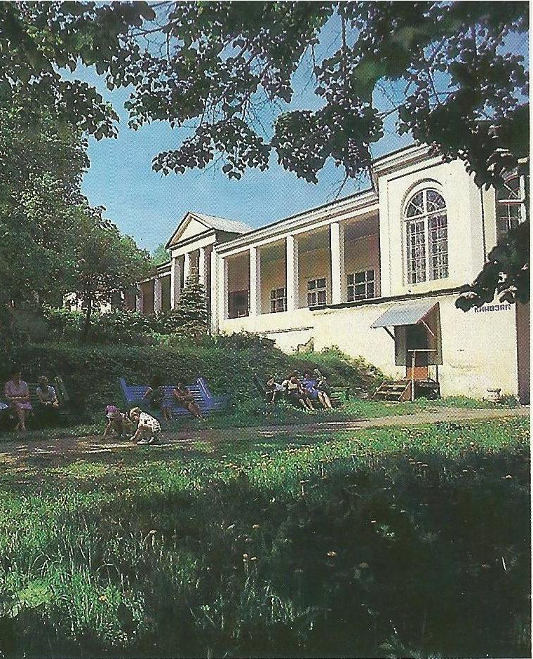 Столовая и клуб до им. Куйбышева г. Таруса